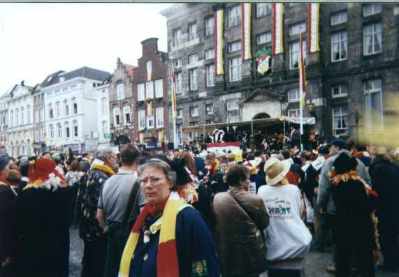 Beeld van de Bossche Markt met Carnaval, foto zelf gemaakt tijdens Carnaval in 2004. categorie:afbeelding 's-Hertogenbosch